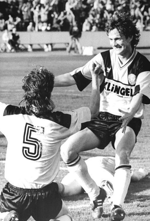 ADN- Matthias Hiekel 6.10.90- Dresden: Fußball-Oberliga 1. FC Dynamo Dresden - Rot-Weiß Erfurt 3:0 (1:0) Die Dynamo-Spieler Torsten Gütschow (r.) und Steffen Büttner (Nr.5) können jubeln - beide schossen ein Tor für ihr Team.